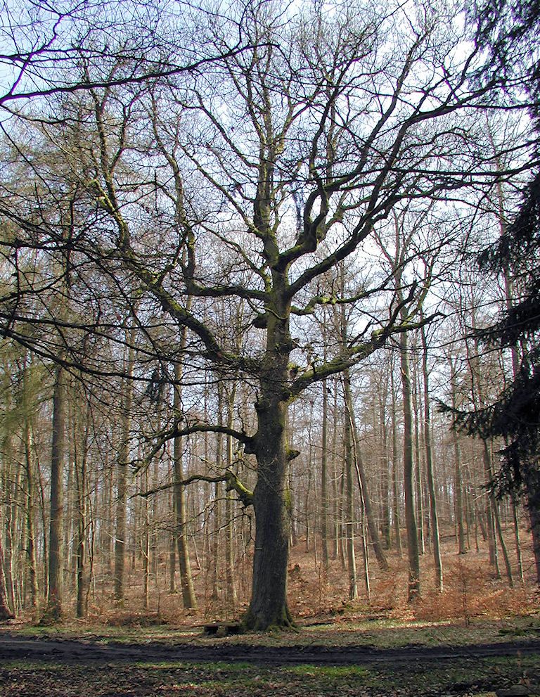 Heul-Eiche: Auf einem 425 Meter hohen Bergsattel im Naturraum Zollbuche, am alten direkten Weg aus dem Hinterland zur ehemaligen Provinzhauptstadt Gießen, steht eine weit über 400 Jahre alte Eiche. Sie hat einen Kronendurchmesser von ca. 24 Meter und einen Stammumfang von 4,10 Meter (in 1 m Höhe gemessen). Ihr Standort ca. 10 Meter hinter der Gemeindegrenze von Bad Endbach (Wommelshausen) auf dem Gemeindegebiet Gladenbach (Weidenhausen) weist sie als ehemaligen Grenzbaum aus. Hier wurden früher und noch bis zum Bau der Aar-Salzböde-Eisenbahn, Wanderhändler (Strumpfmänner), Wanderarbeiter(innen) und einberufene Soldaten tränenreich von ihren Angehörigen und Freund(innen)en verabschiedet. Daher ihr Name „Heul-Eiche“. [17] Während des Ersten und des Zweiten Weltkrieges war die Heul-Eiche wiederum Abschiedsbaum, diesmal in umgekehrter Richtung. Für die einberufenen Soldaten aus Bischoffen-Oberweidbach war der Bahnhof in Wommelshausen-Hütte der nächstgelegene.